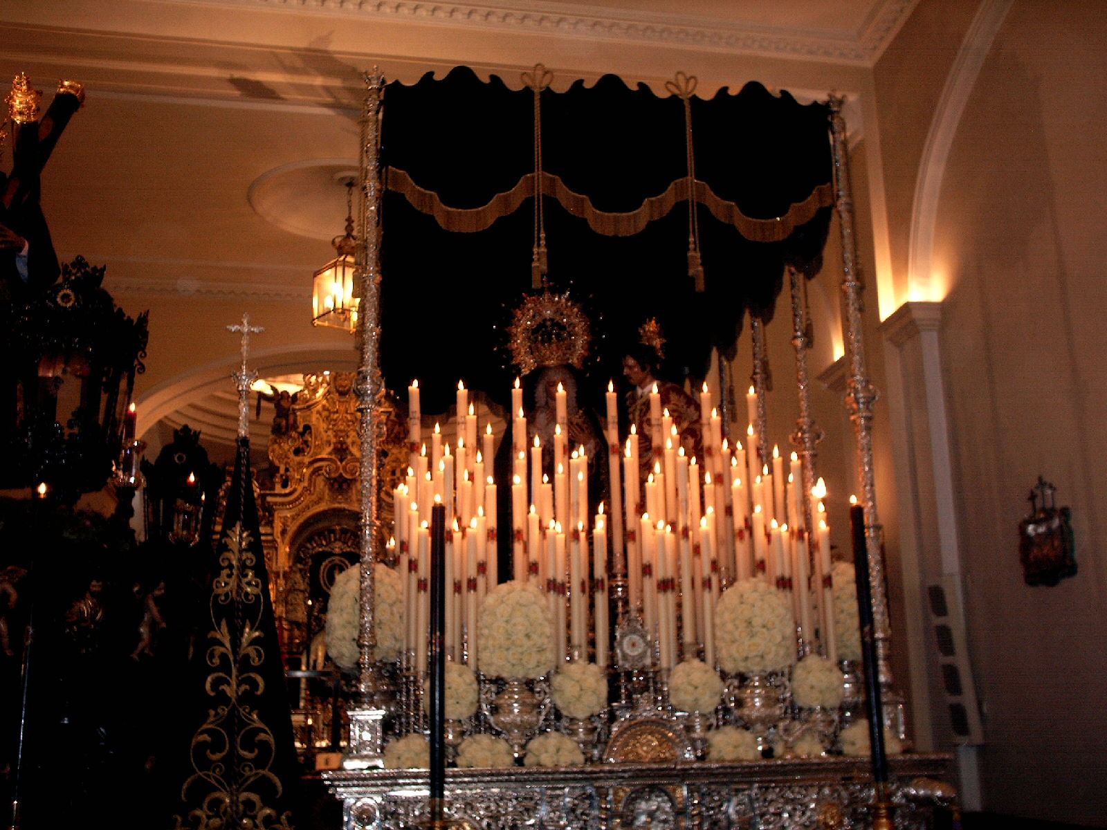 Foto realizada el día de su penintencia en la capilla